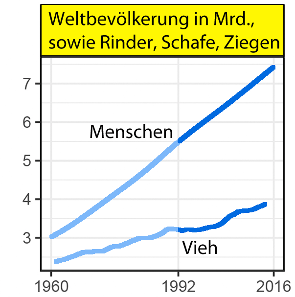 Änderung der Weltbevölkerung sowie Rinder, Schafe und Ziegen nach „World Scientists’ Warning to Humanity: A Second Notice“ 2017